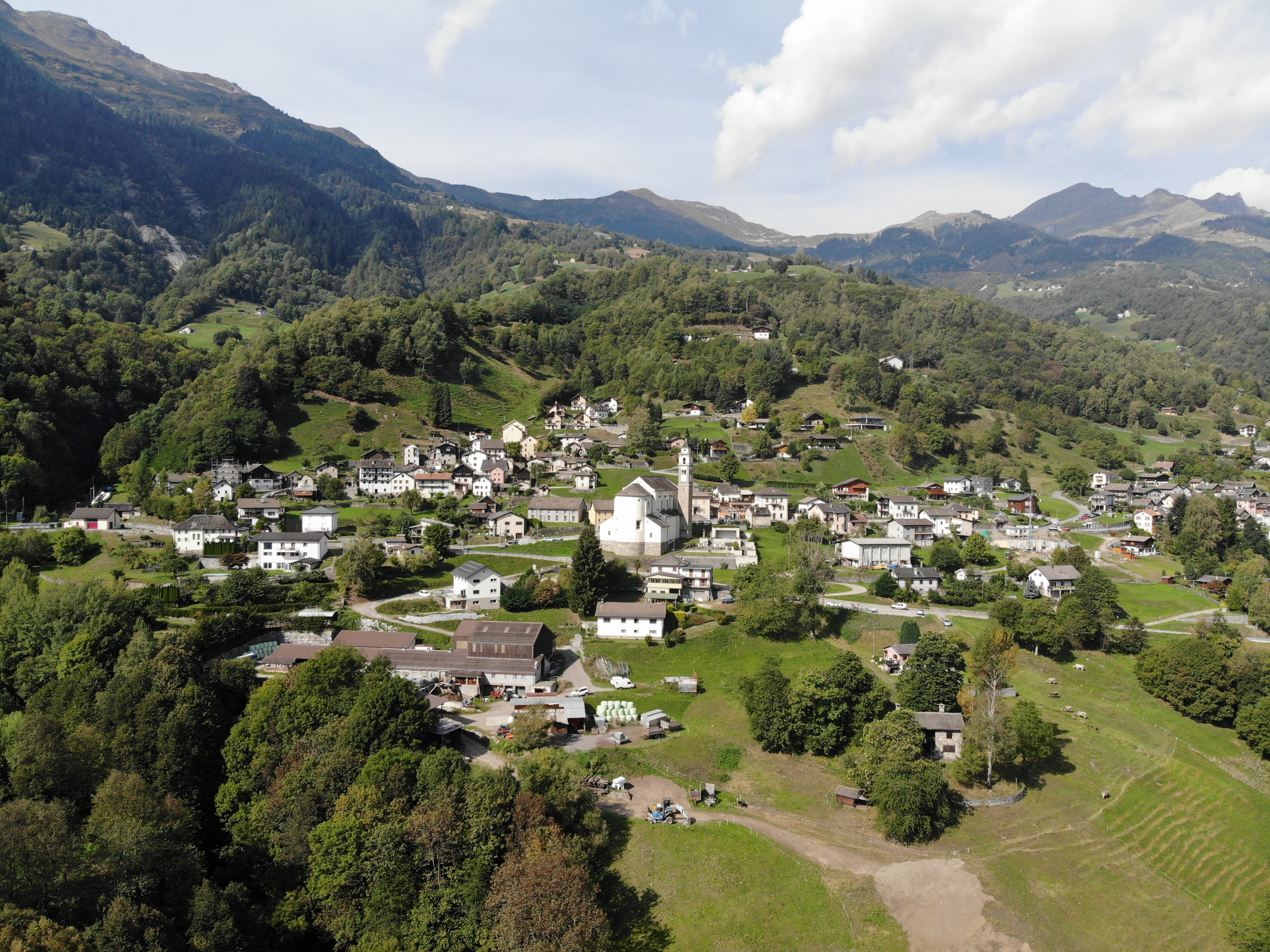 Leontica